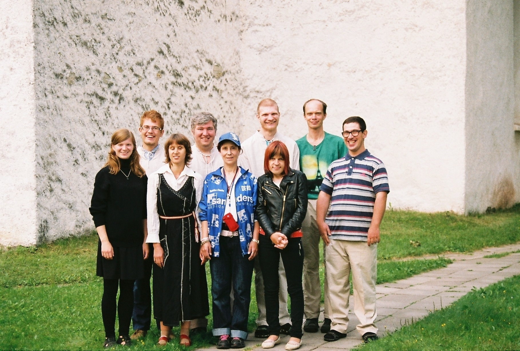 Pilt on tehtud Pärnu-Jaagupi kiriku juures pärast esinemist seal. Pildil on tagareas vasakult: Margus Kosarev, Renee Logberg, Hermo Hodanjonok, Assar Järvekülg; esireas vasakult: Kertu Rein, Veronika Sõstar, Aile Bergmann, Maarja Maria Känd ja Vartan Arutjunov.